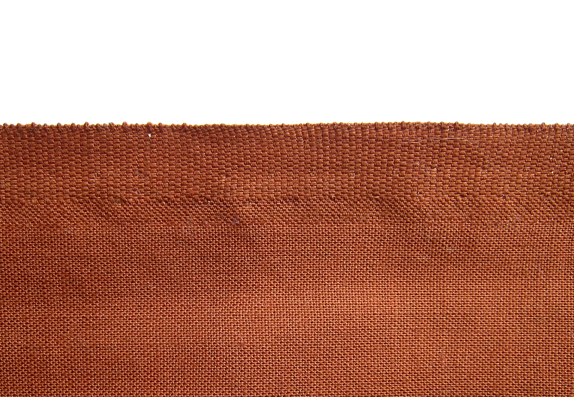 Webkante